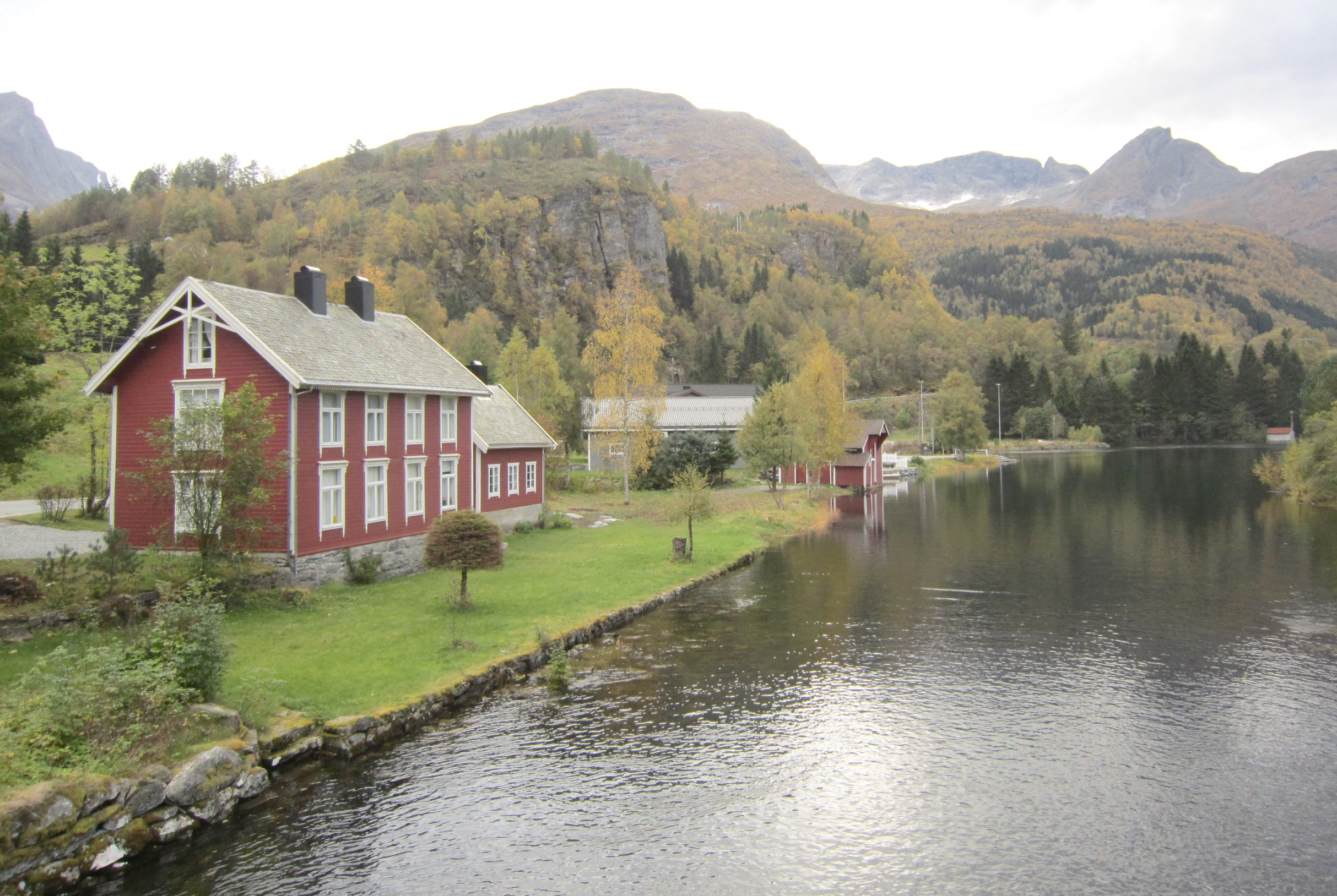 Fyrde, rett før Fyrdselva renner ut i Austefjorden